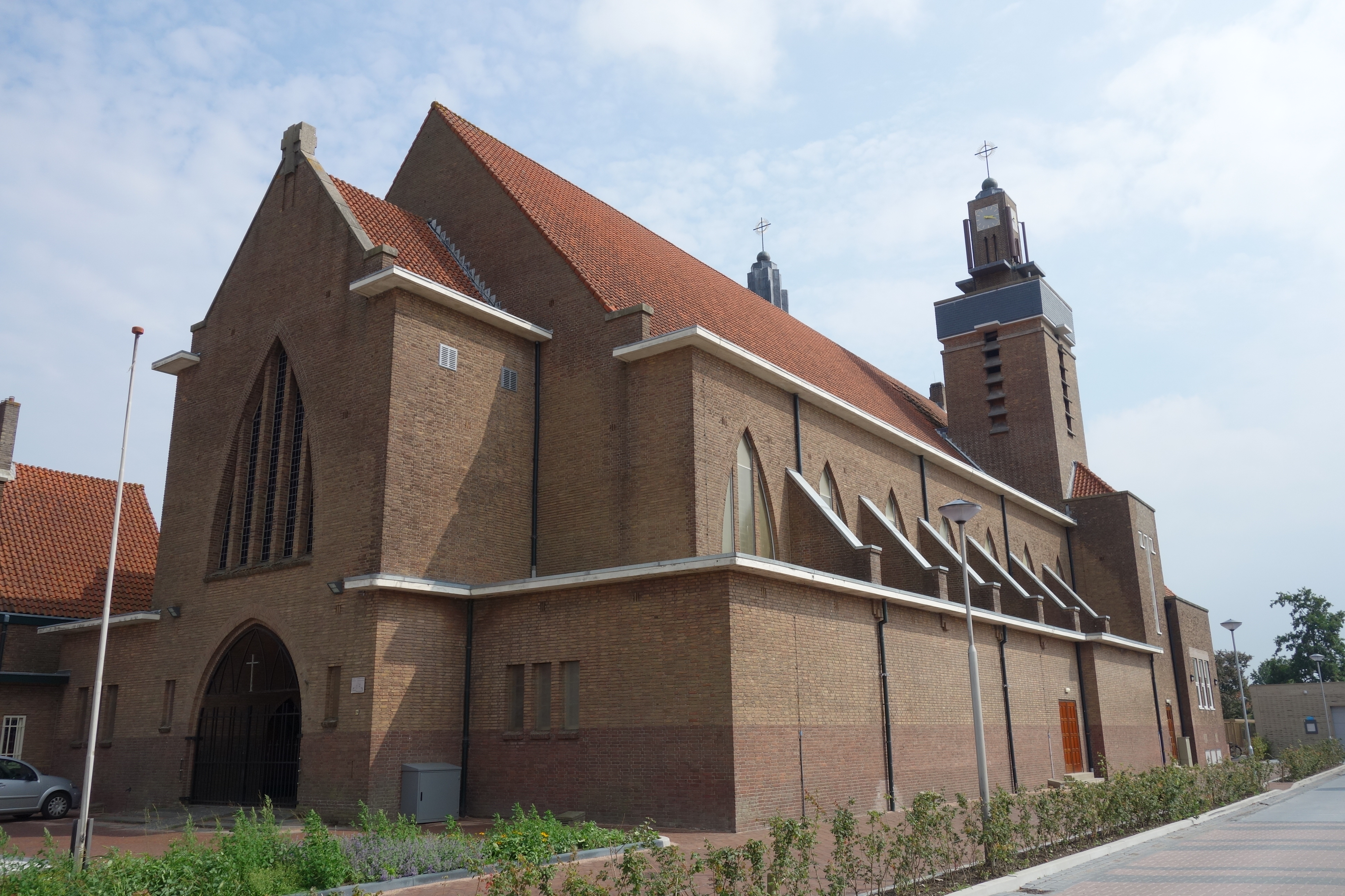 De Laurentiuskerk in Hoogkarspel met de twee torens achteraan de kerk. De torens hebben elk ook verschillende vormen.